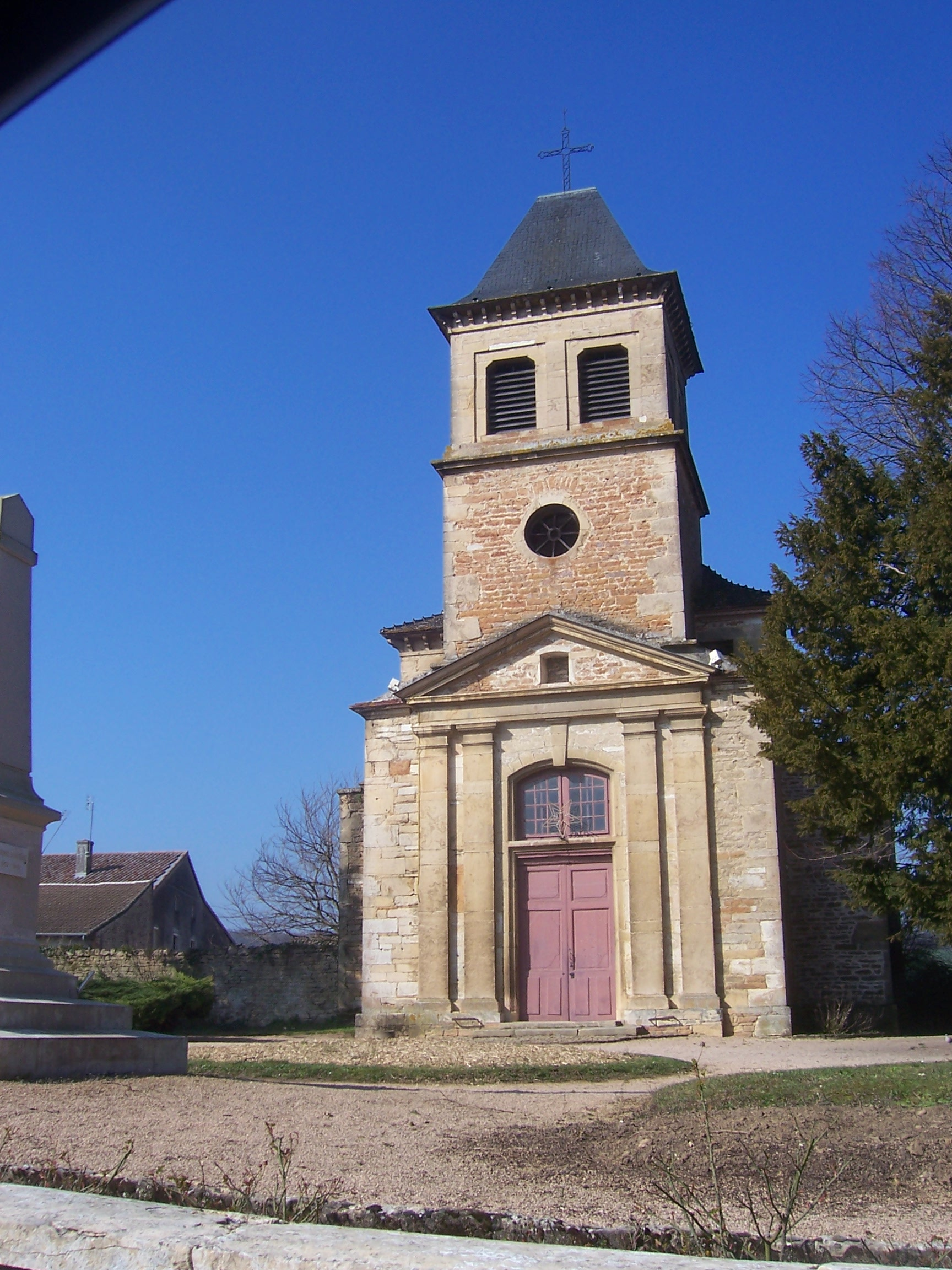 Eglise de Senozan